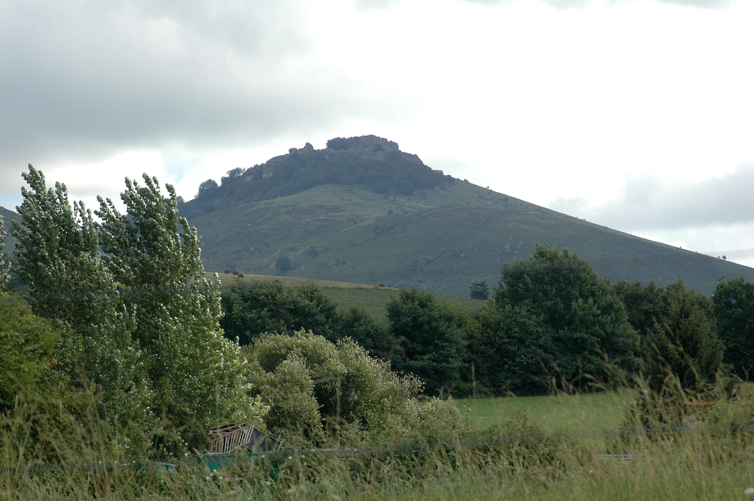 Espelette, le Mondarrain vu du village. Photo prise le 08/08/06 par Harrieta171